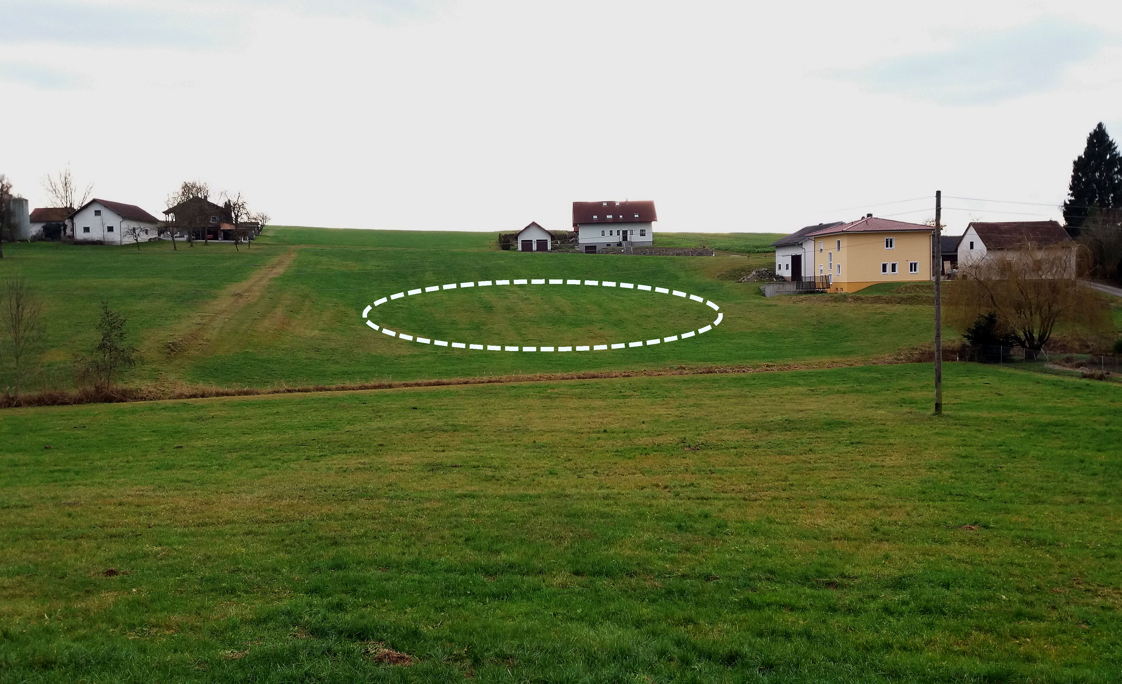 Lagestelle des abgegangenen Schlosses Hackenbuch in der der Ortschaft Hackenbuch der Gemeinde St. Marienkirchen bei Schärding, Oberösterreich.